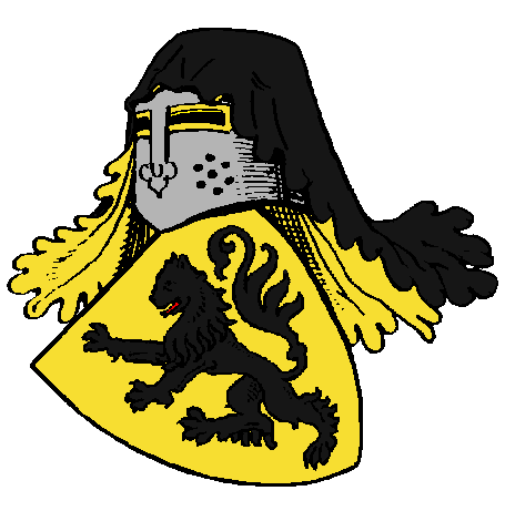 Stammwappen der Grafen von Nürings.